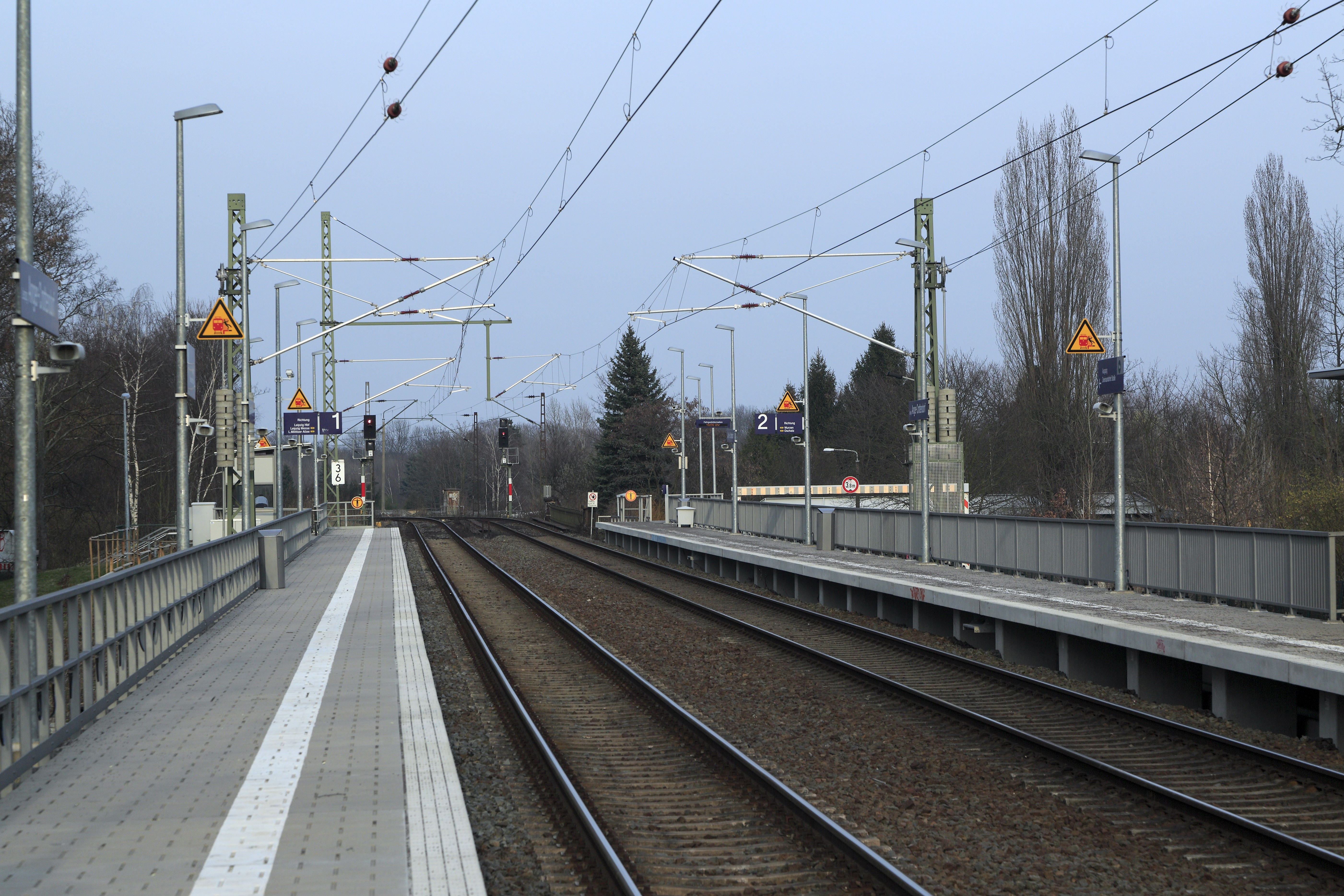 Bahnsteige, Richtung Abzw Anger. Der Haltepunkt ist nicht barrierefrei, es gibt pro Seite nur einen kleinen Unterstand. Offiziell ist er jedoch nur eine Zwischenlösung, die mit dem Neubau der Brücke über die Zweinaundorfer Straße durch einen Inselbahnsteig ersetzt werden soll.